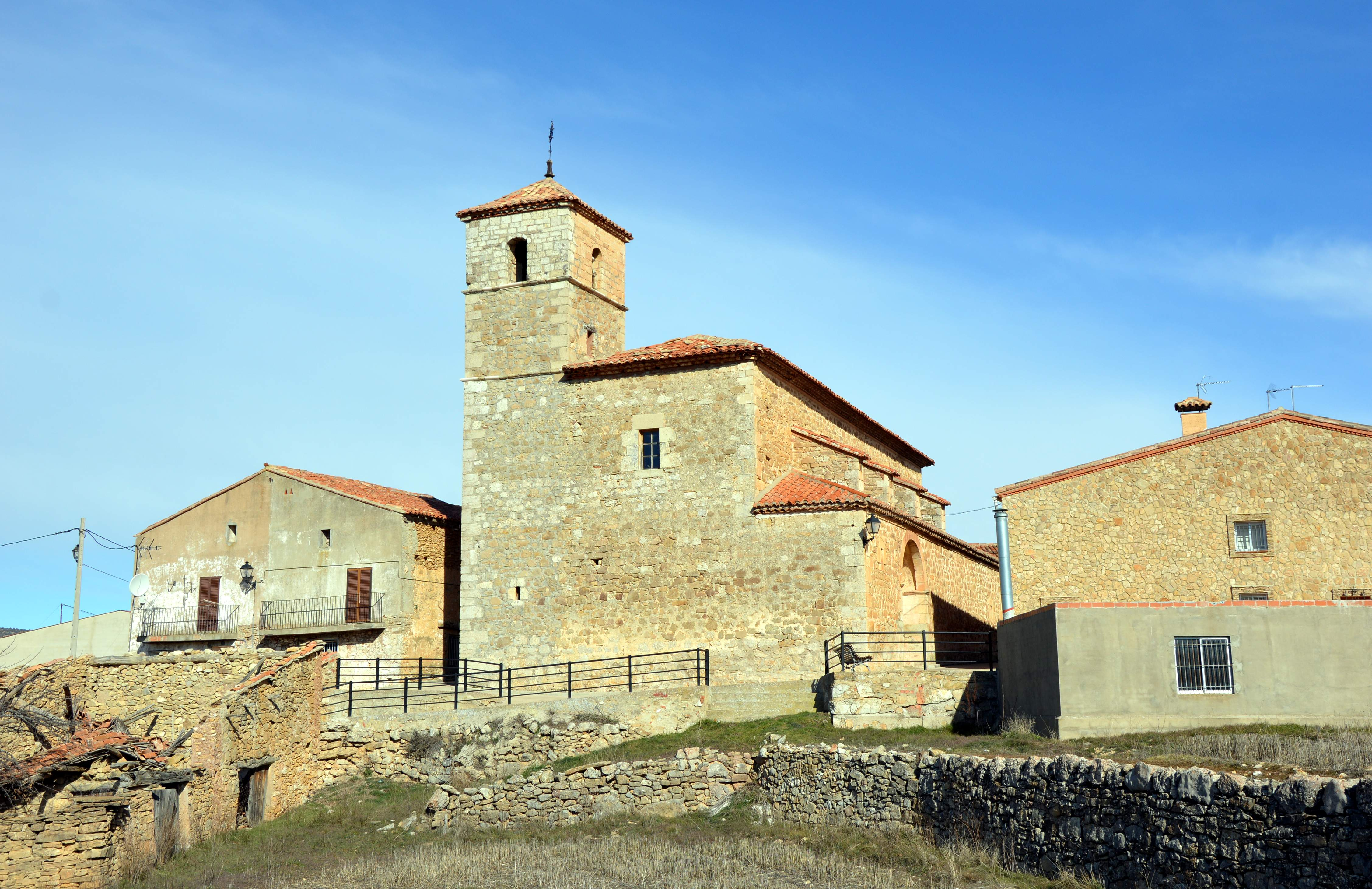 Vista general (suroriental) de la iglesia parroquial de la Sma. Trinidad en Veguillas de la Sierra (Teruel), año 2017.